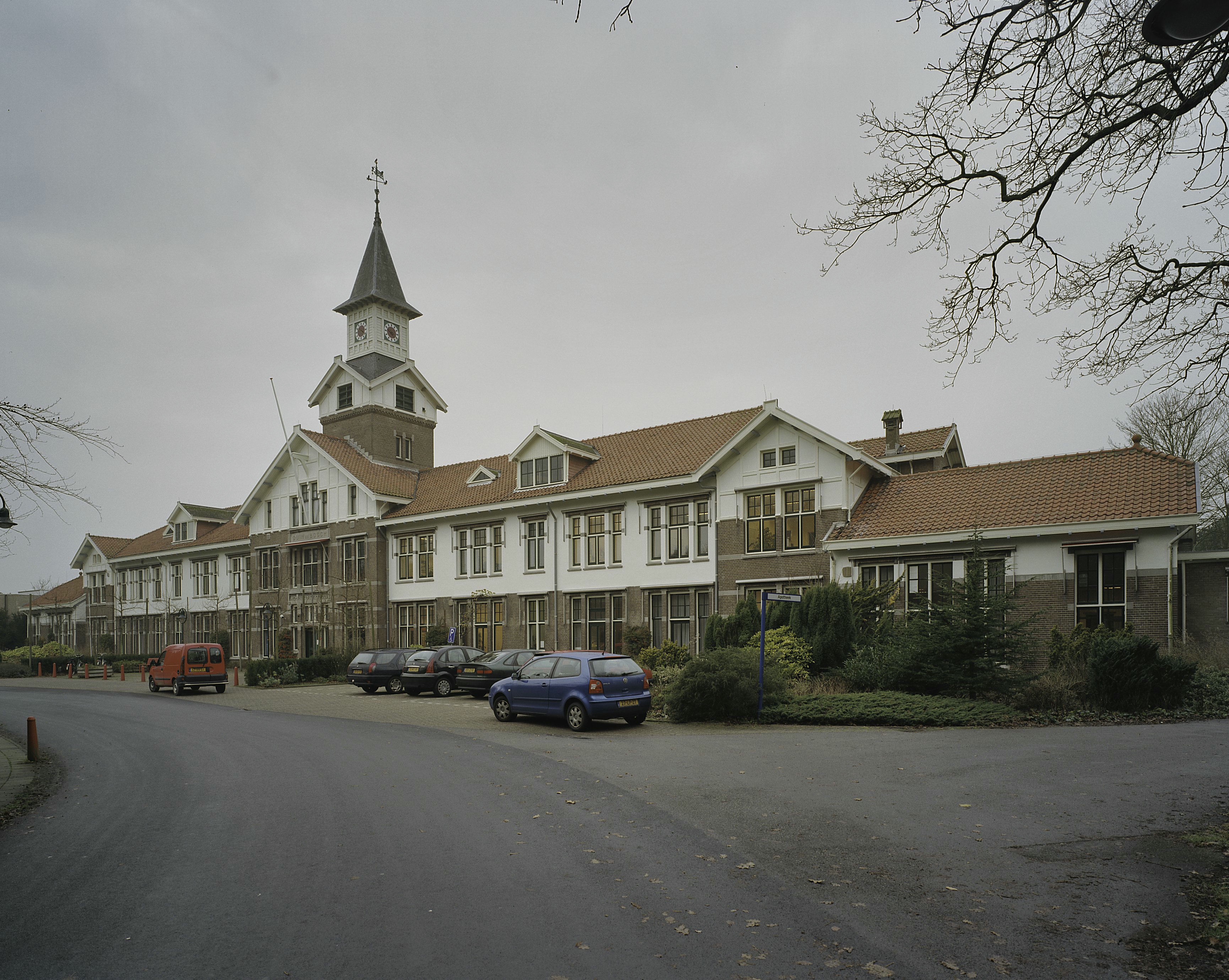 Psychiatrische inrichting Duin en Bosch: Overzicht hoofdgebouw (opmerking: Gefotografeerd voor Monumenten In Nederland Noord-Holland)